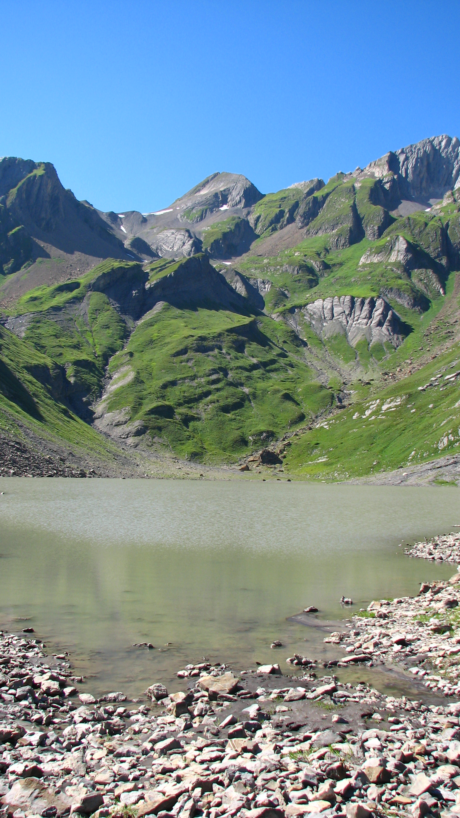 et dents blanches dans le fond.